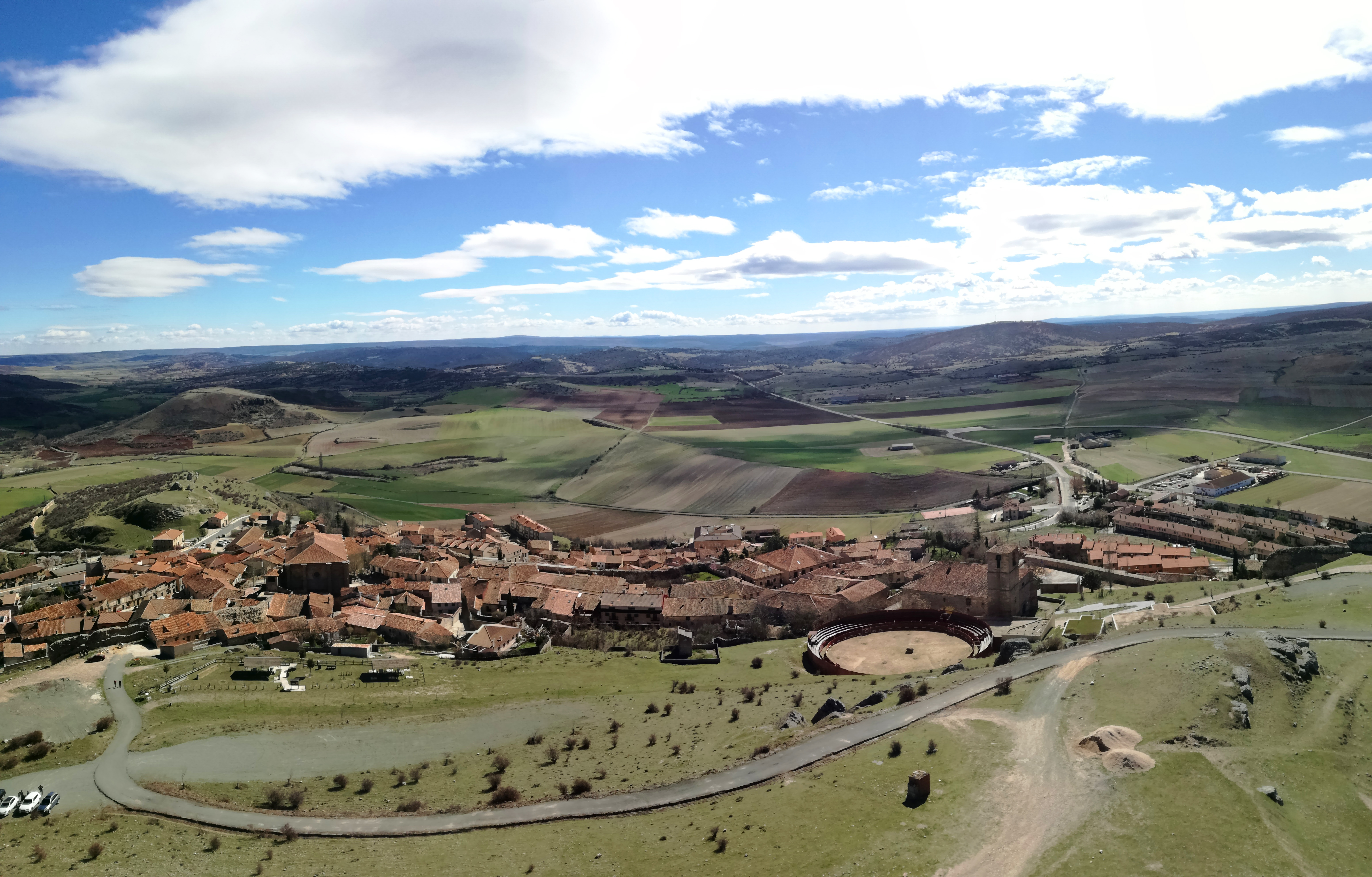 El pueblo de Atienza, visto desde el Castillo de Atienza.